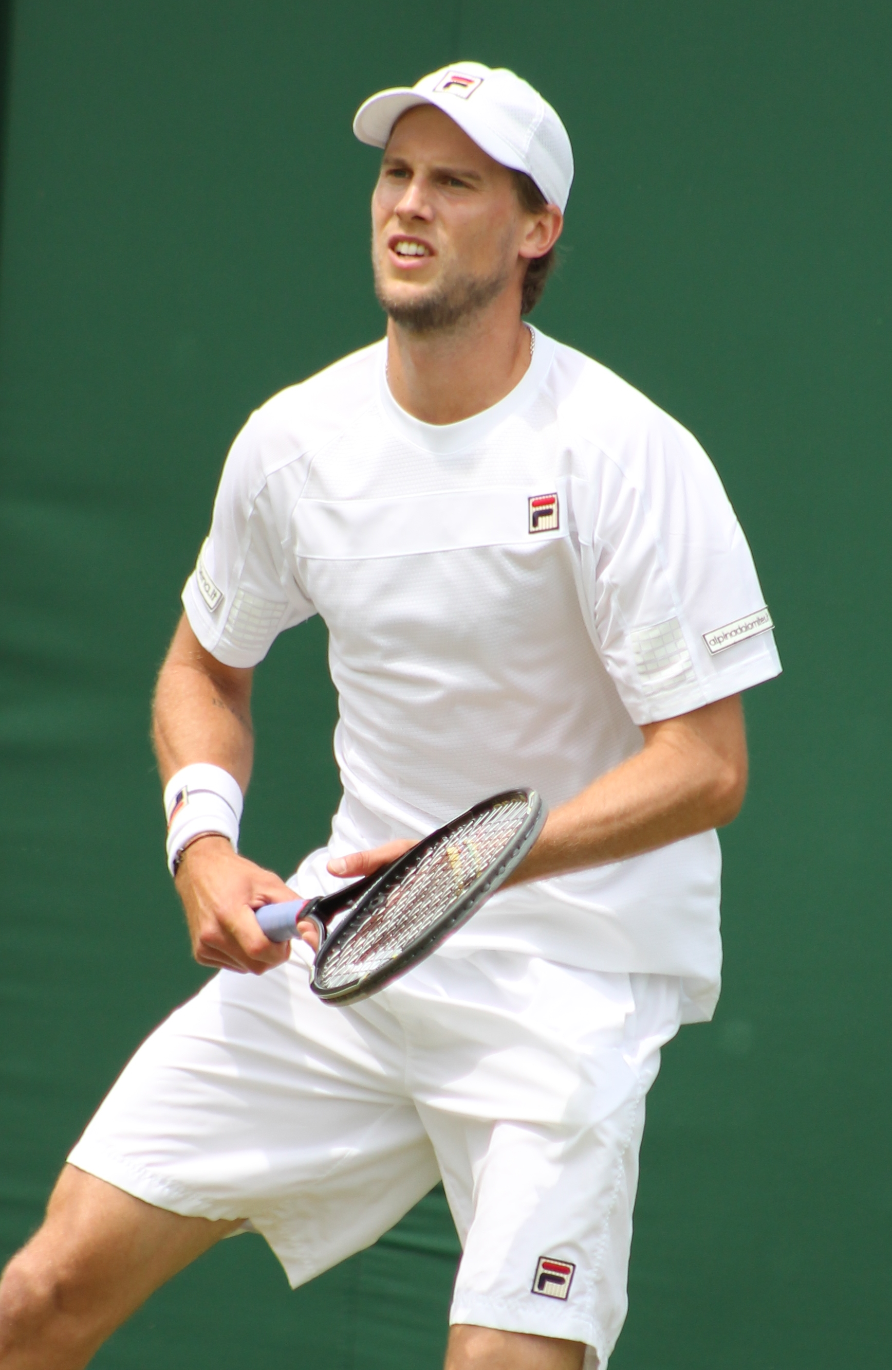 Seppi WM14 (6)